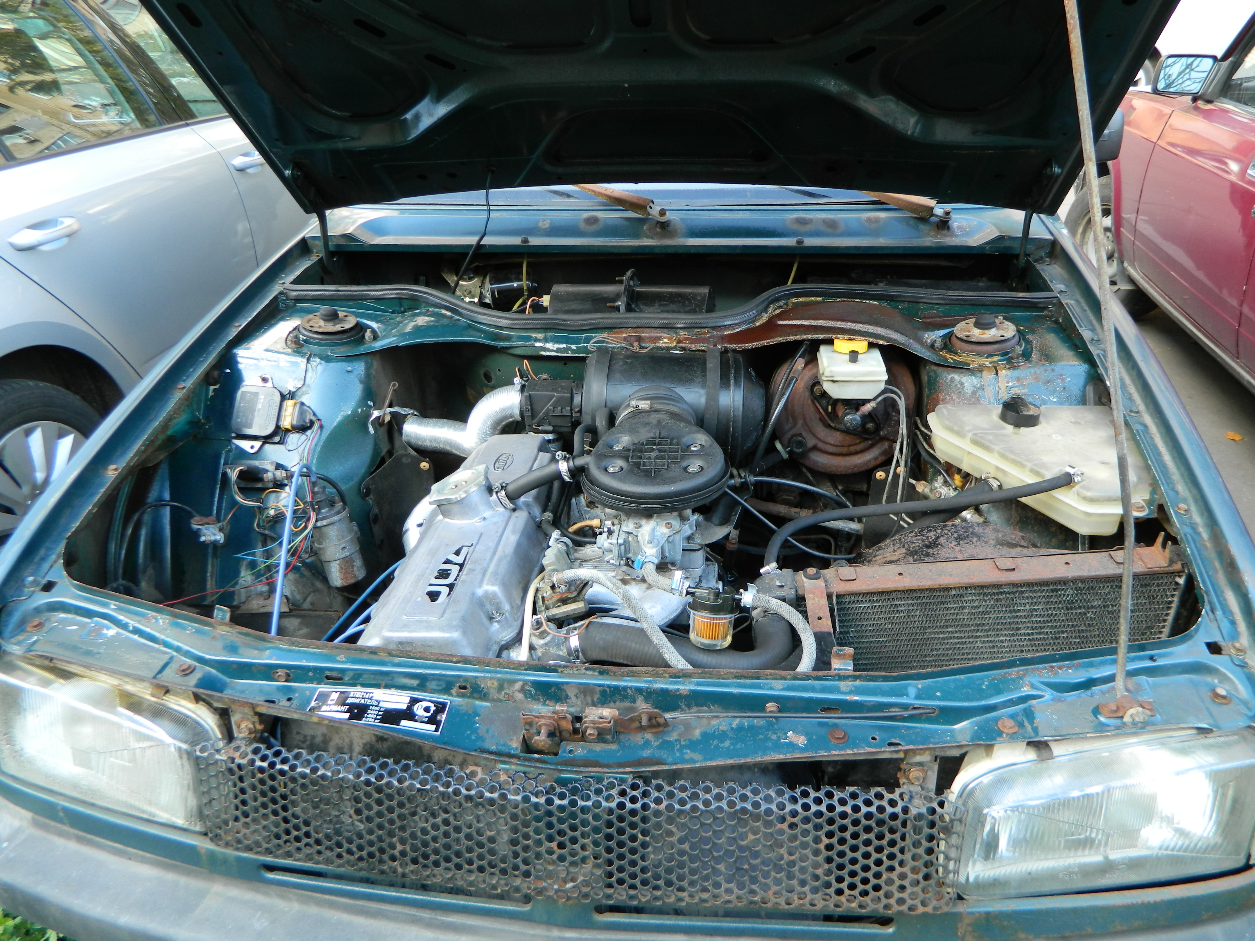 Двигатель УЗАМ 3317 под капотом Москвич Святогор 214122 2001 года выпуска. Печка нового образца, решетка радиатора последнего выпуска. ЧЯ нового образка.